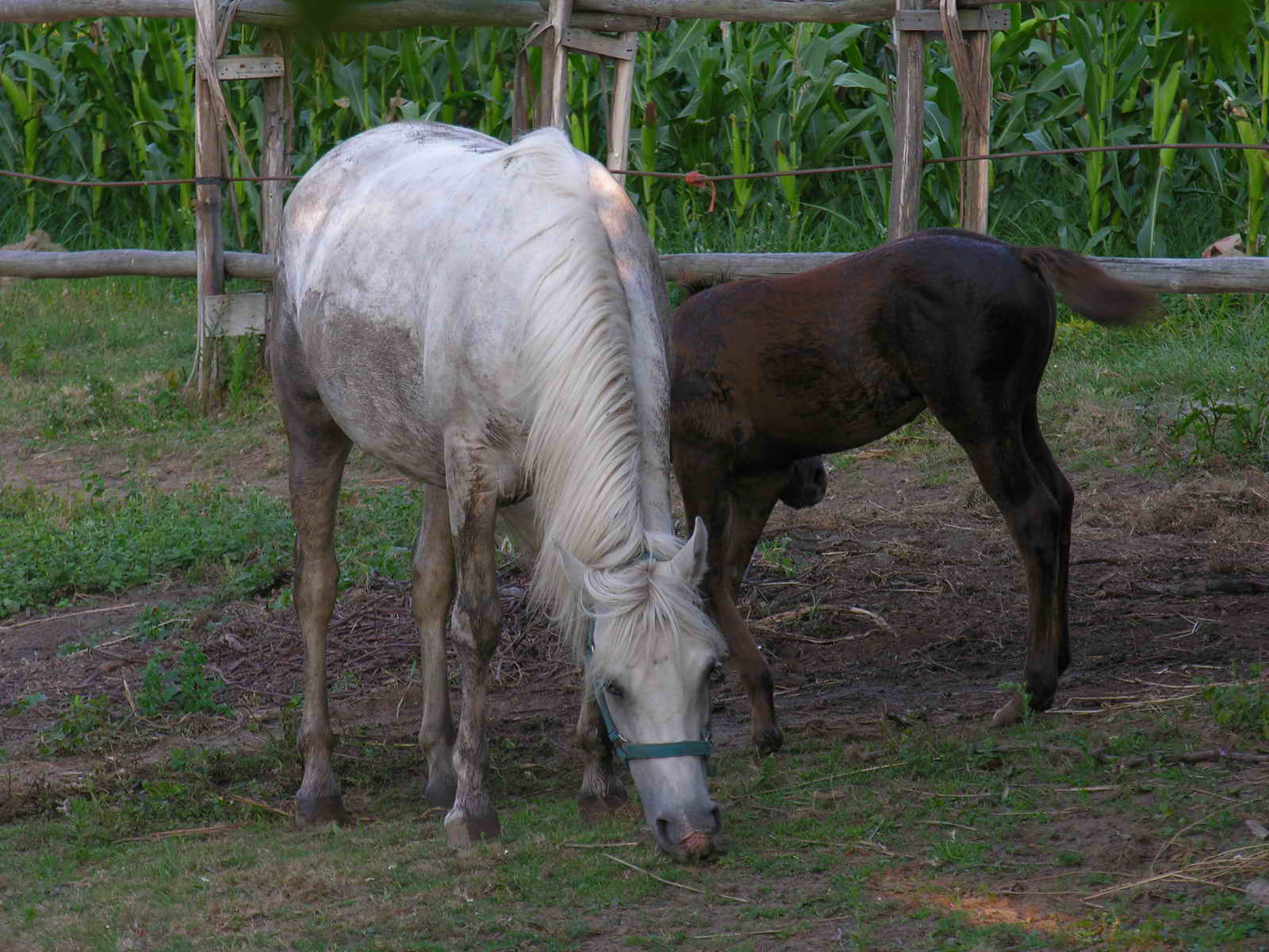 Cabalos en Bastabales - Galicia - Spain. Foto tirada cunha Nikon E8800